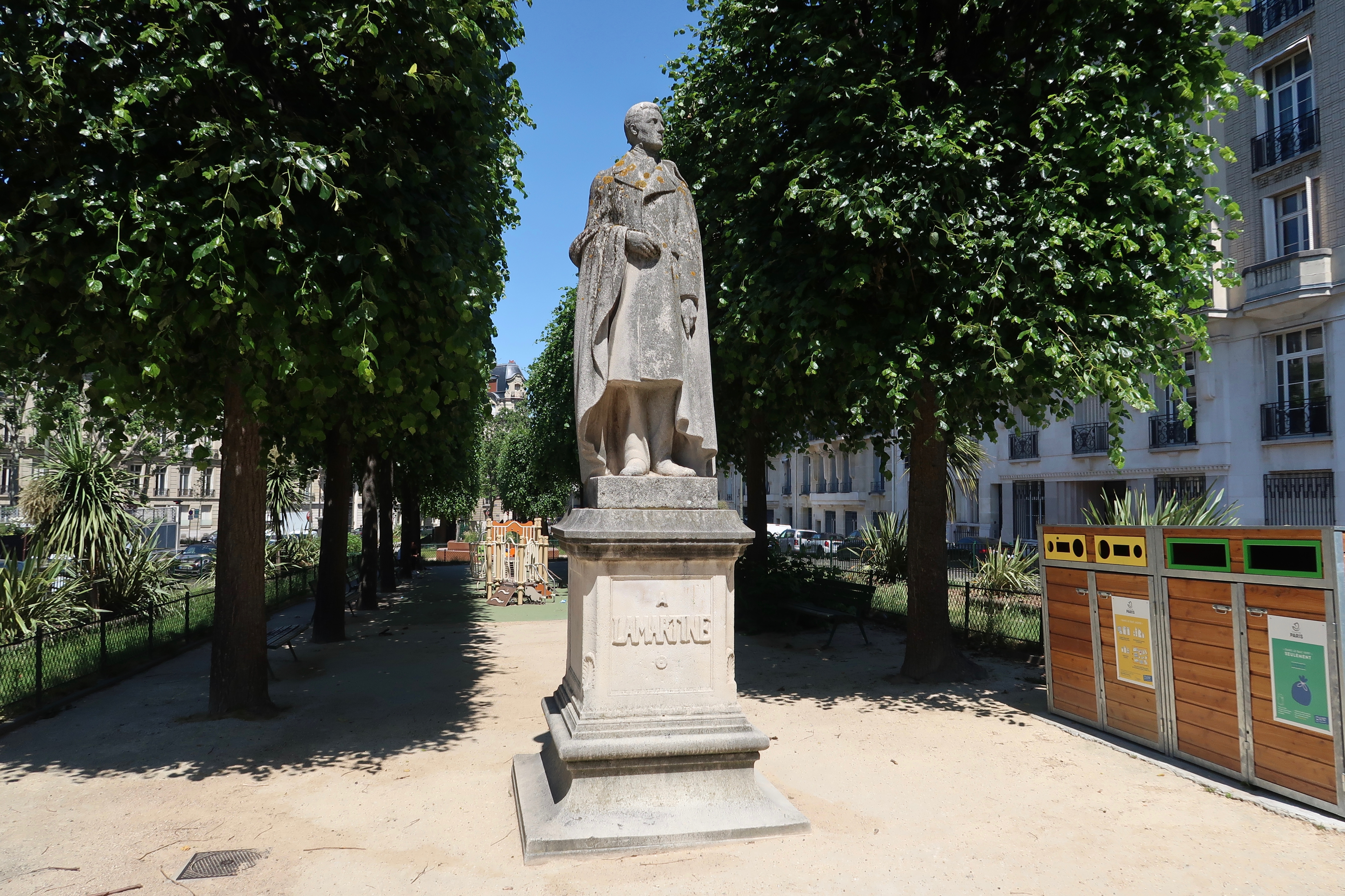 Statue de Lamartine, square Lamartine (Paris, 16e).